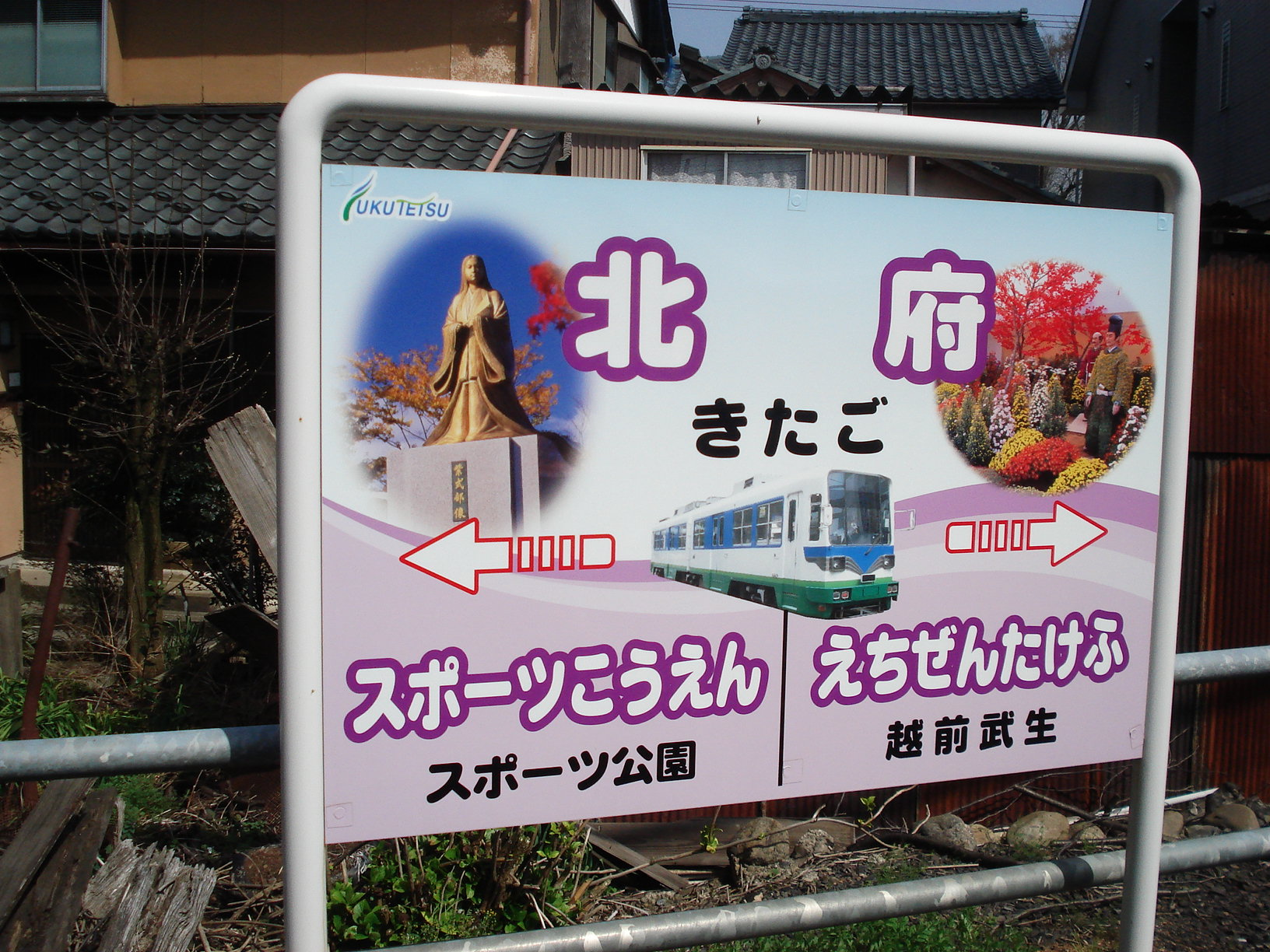 福井鉄道北府駅の駅名板。